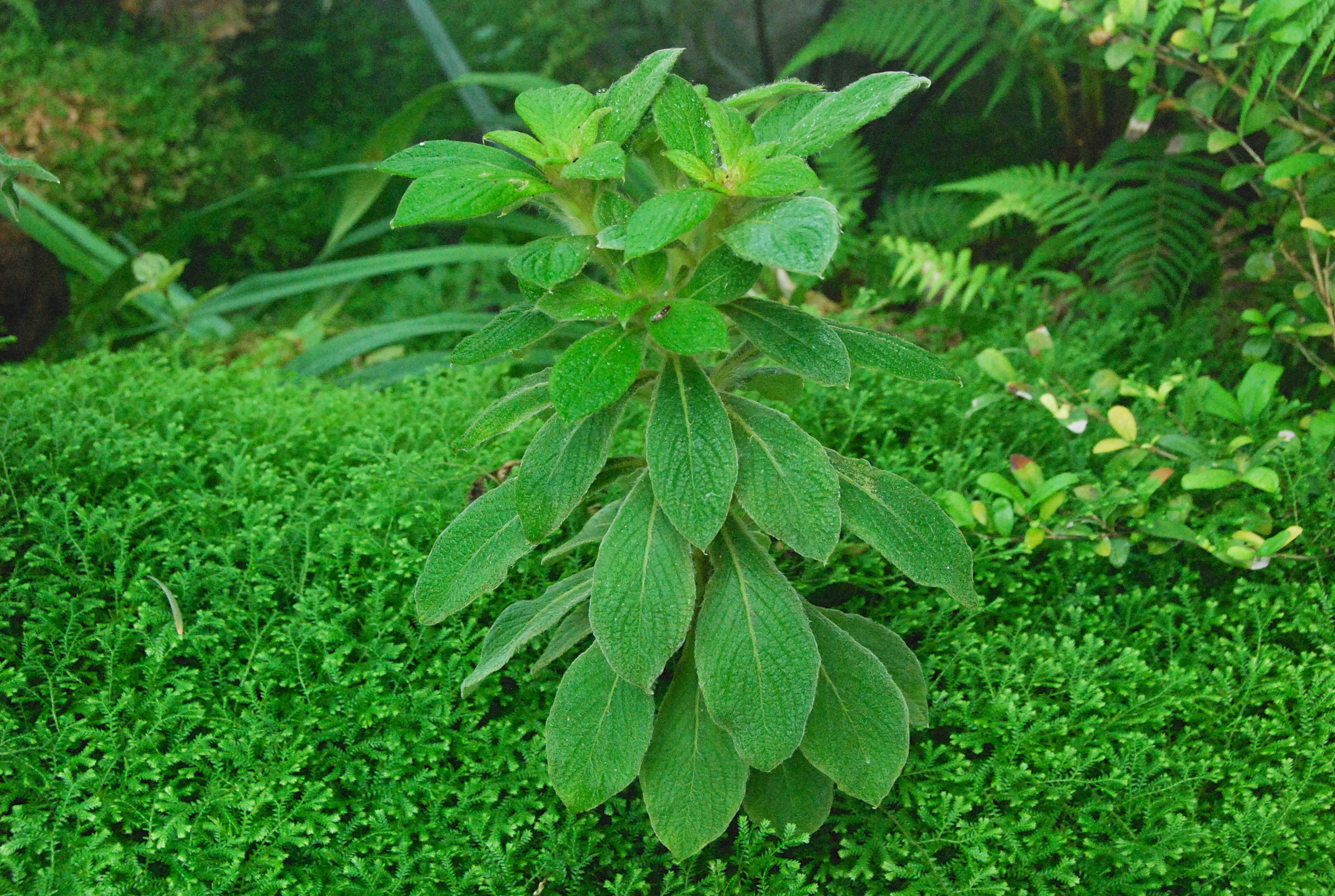 Arbuste